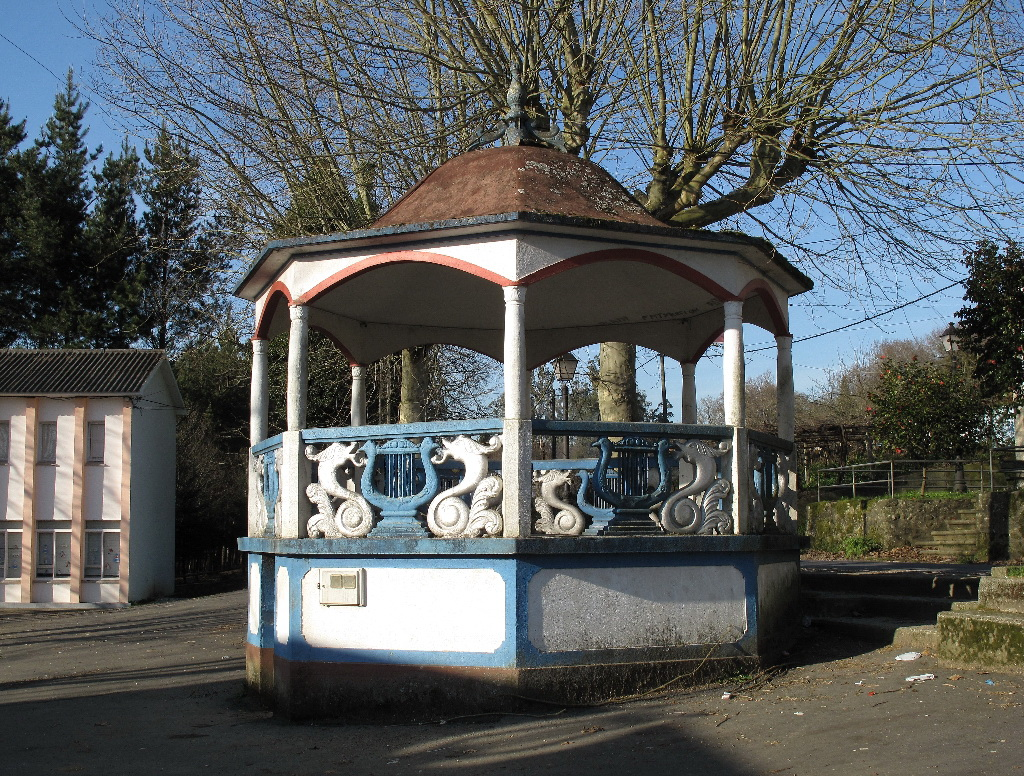 Palco de música no lugar de Cibrán, parroquia de Sales, concello de Vedra, Galiza